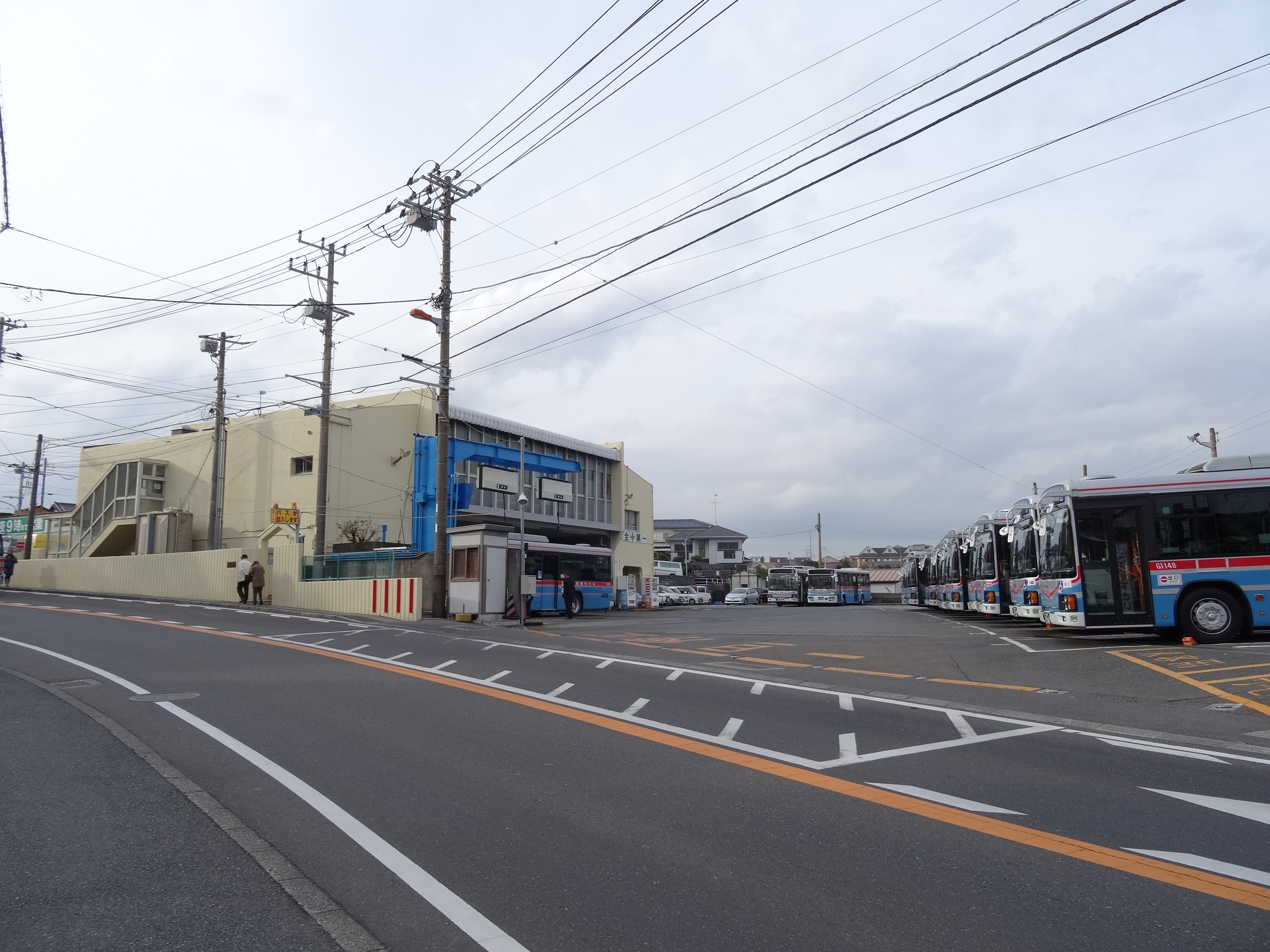 Misaki depot